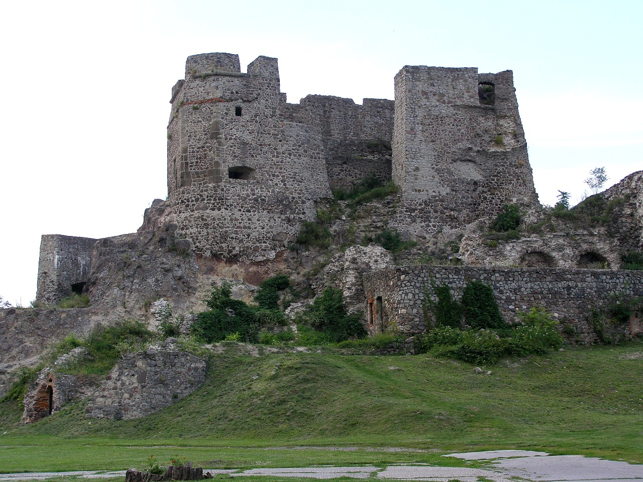 Levický hrad - pohľad z nádvoria